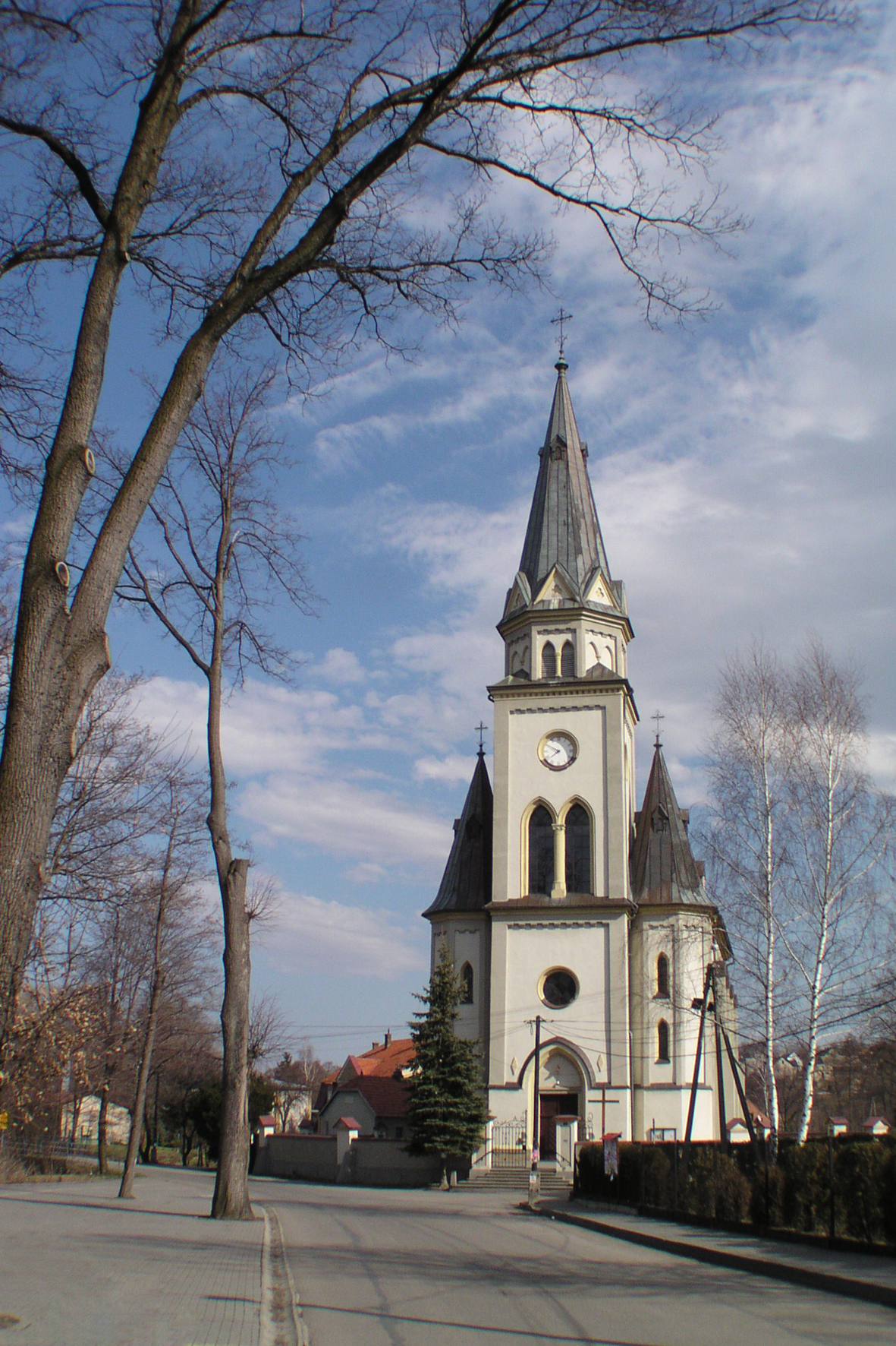 Chocznia- kościół parafialny pod wezwaniem Narodzenia Św. Jana Chrzciciela konsekrowany w 1884 roku